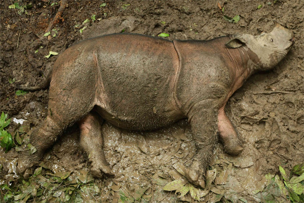 Puntung กระซู่ชนิดย่อย D. s. harrissoni กำลังแช่ปลักในสถานเพาะเลี้ยง กระซู่ตัวนี้จับได้ในรัฐซาบาห์ ในปีพ.ศ. 2554 เพื่อเข้าโครงการอนุรักษ์